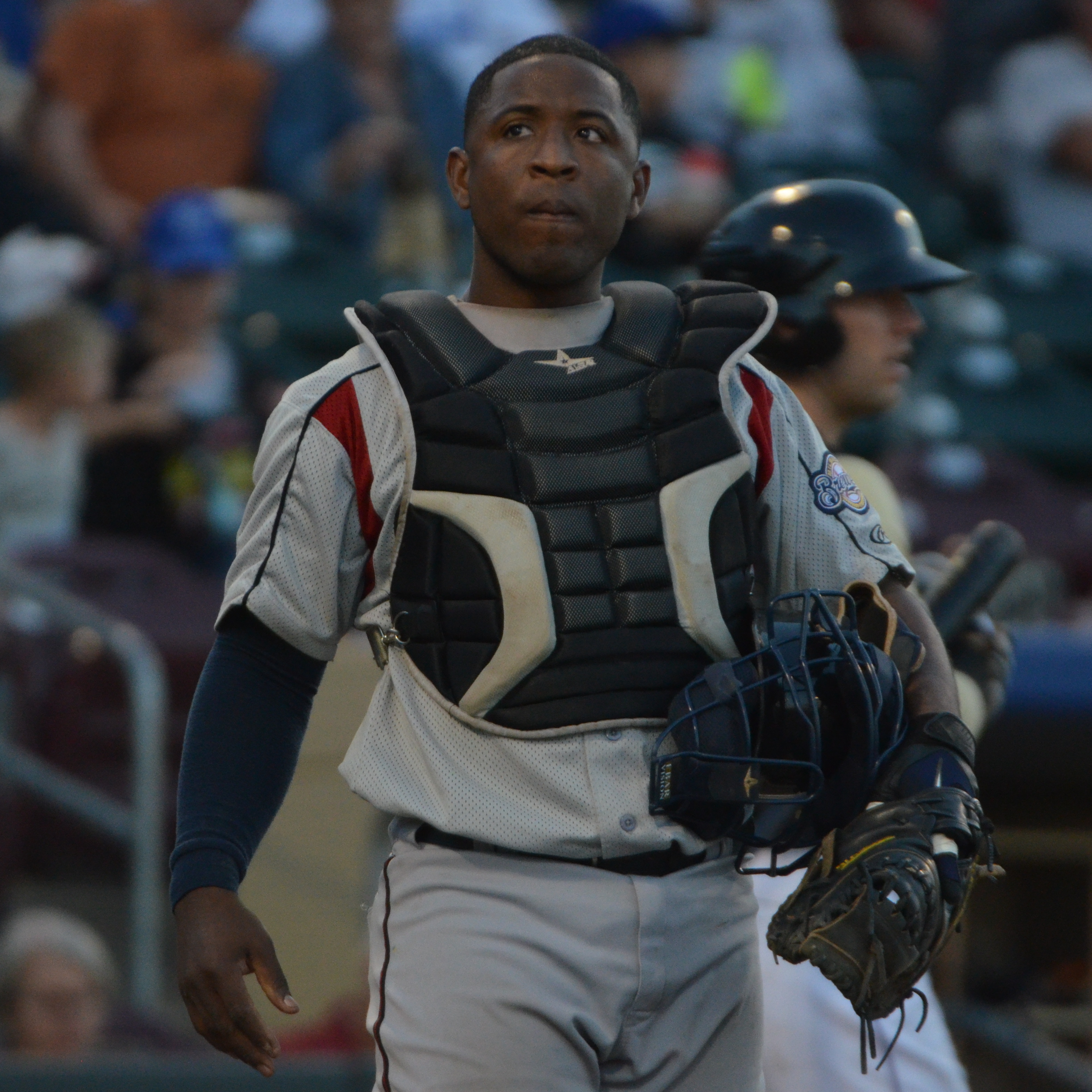 Robinzon Díaz